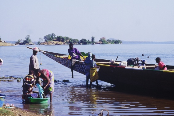 Lac du barrage de Sélingué au Mali. Photo de Olivier EPRON